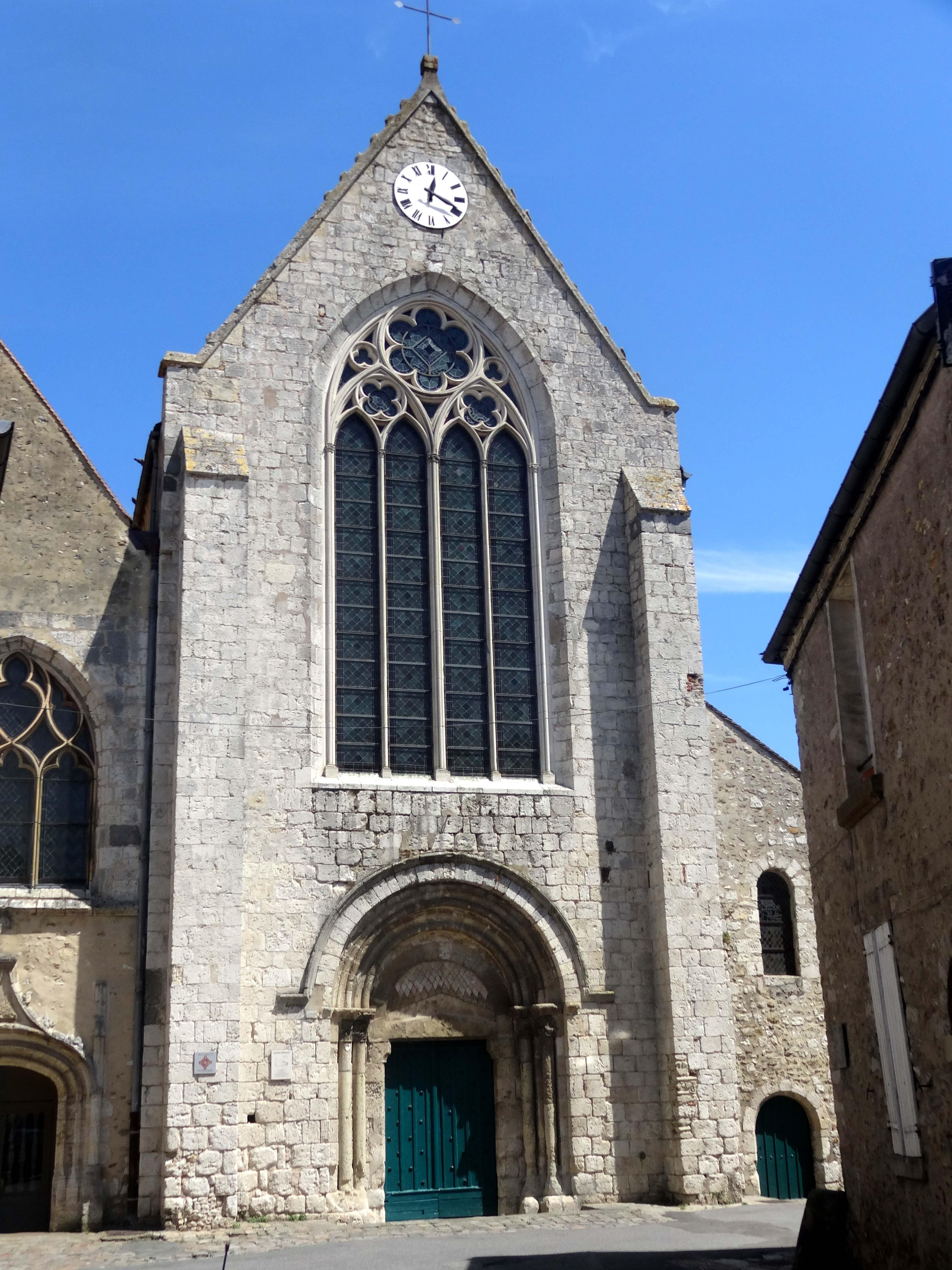 Église Saint-Nicolas de Saint-Arnoult-en-Yvelines - voir titre.